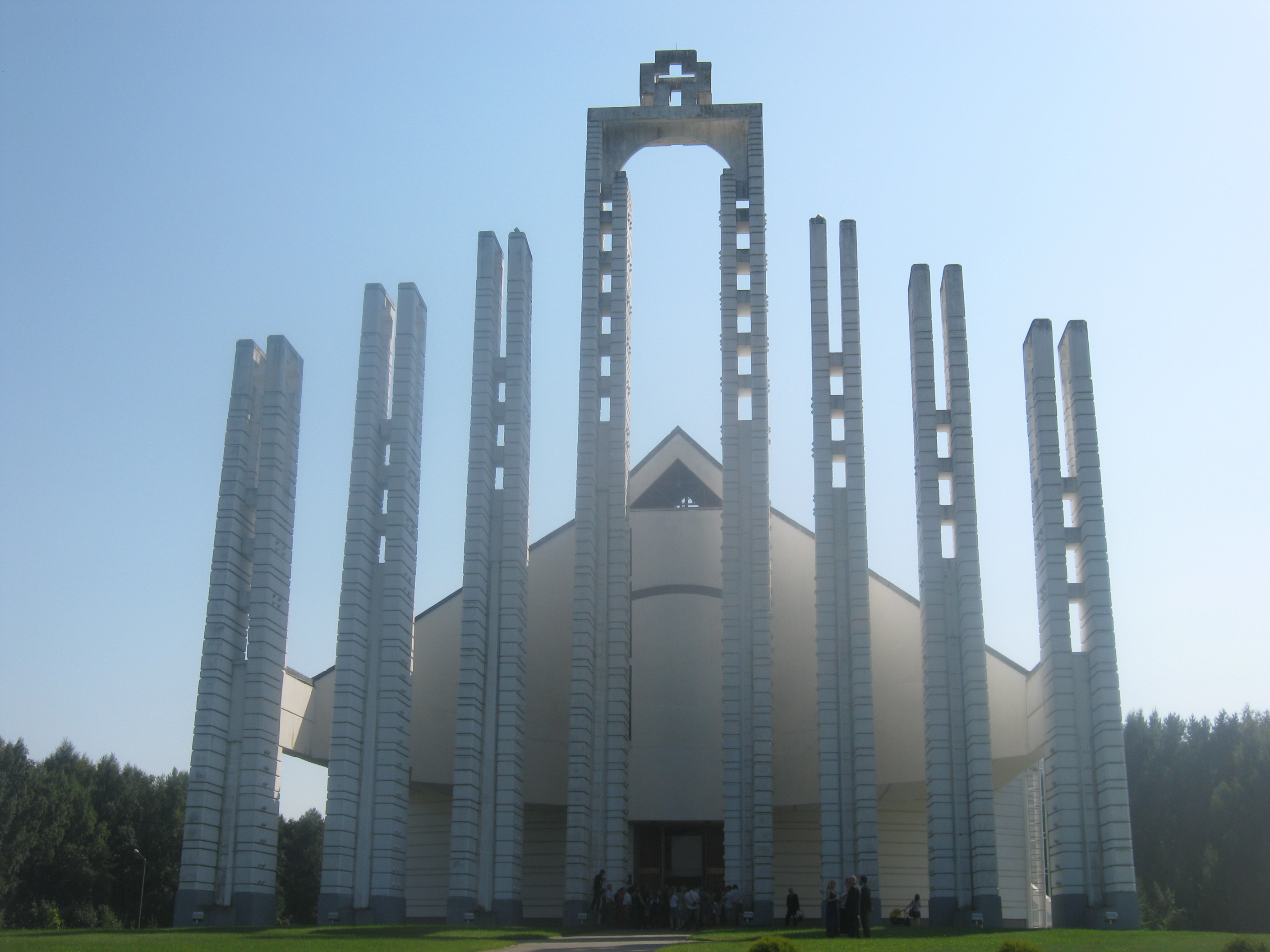 Elektrėnų bažnyčia